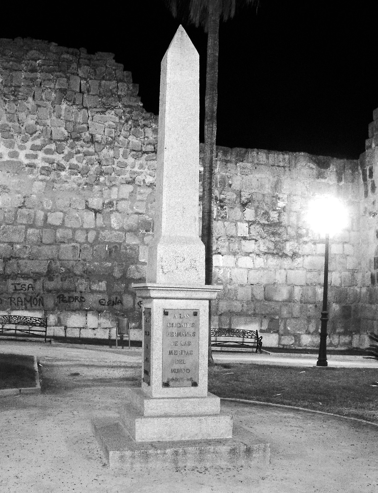 Glorieta de las Meridas del Mundo